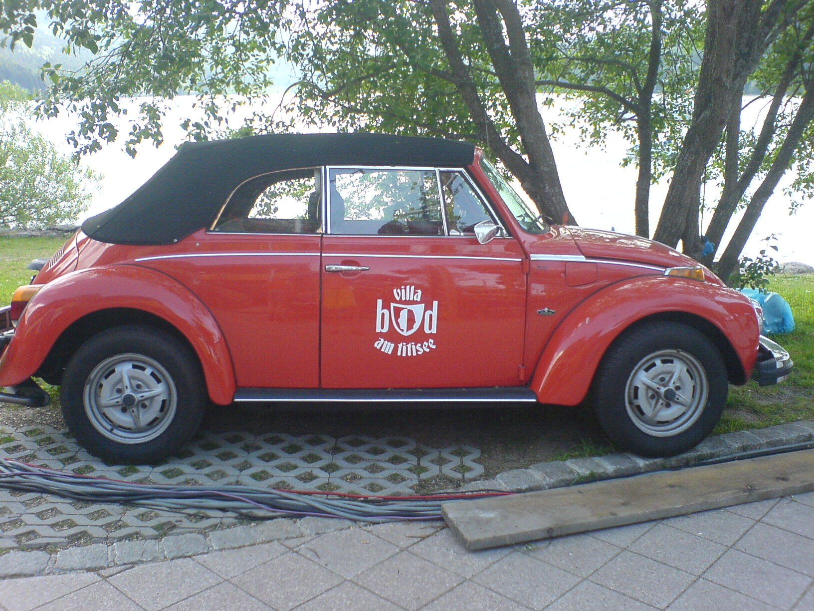 Eigen foto, gemaakt in juni 2006.